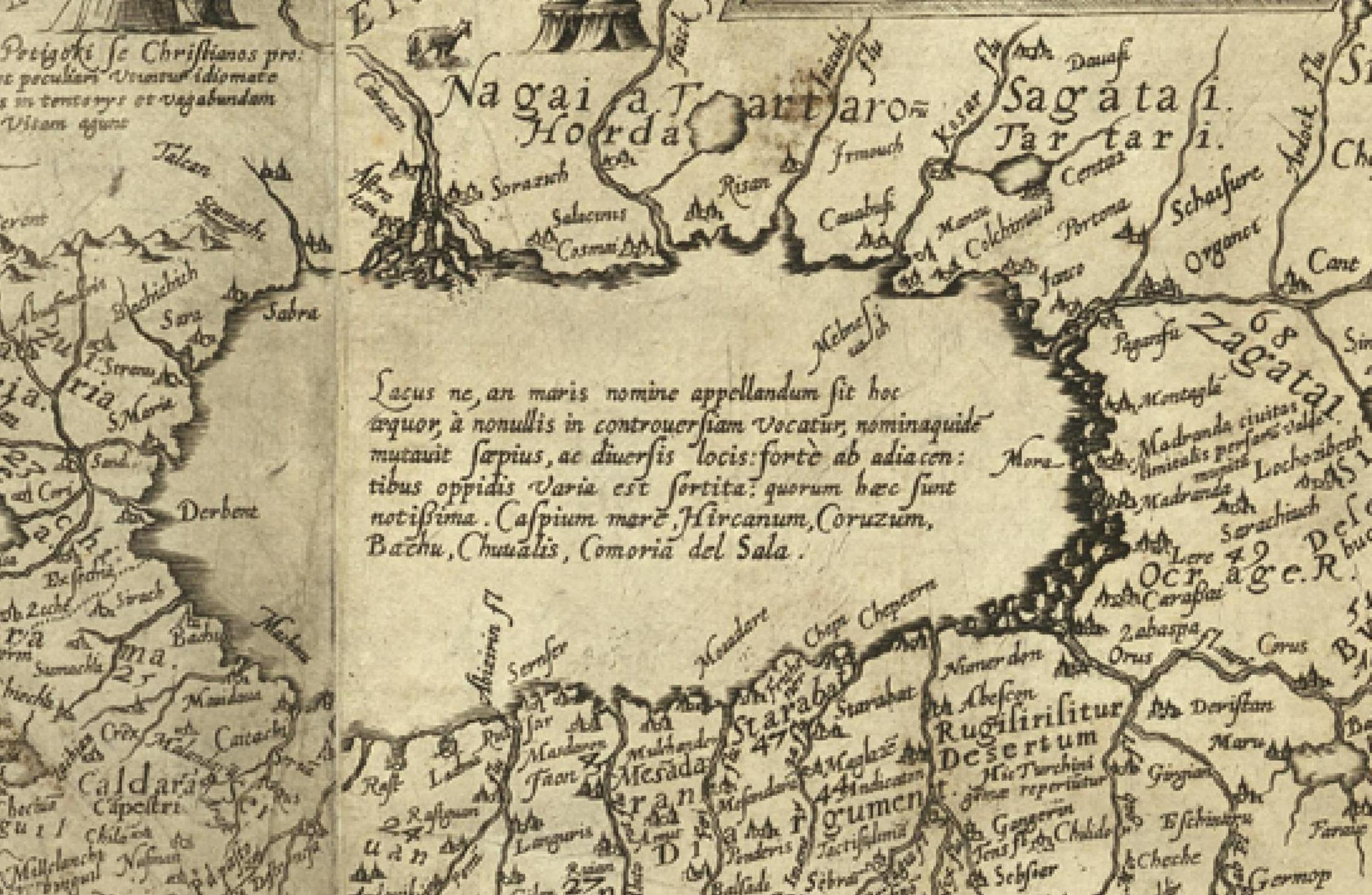 Daniel Keller. Asiae nova descriptio (Antwerpen, 1590)